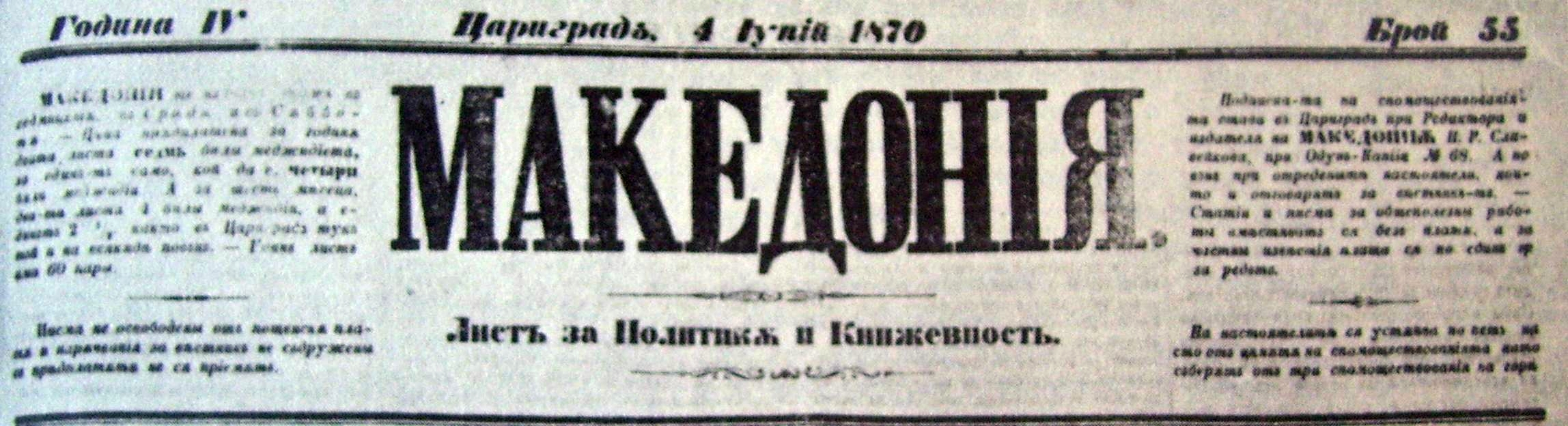 Главата на вестник Македония, брой 55.